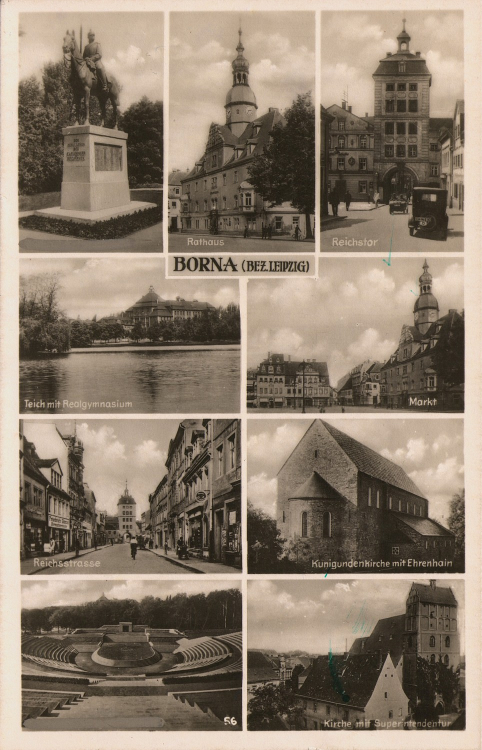 Alte Ansichtskarte von Borna Bez. Leipzig